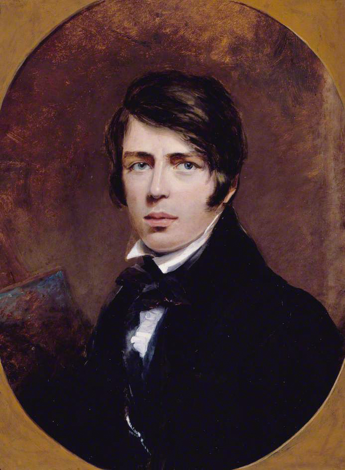 Self-portrait